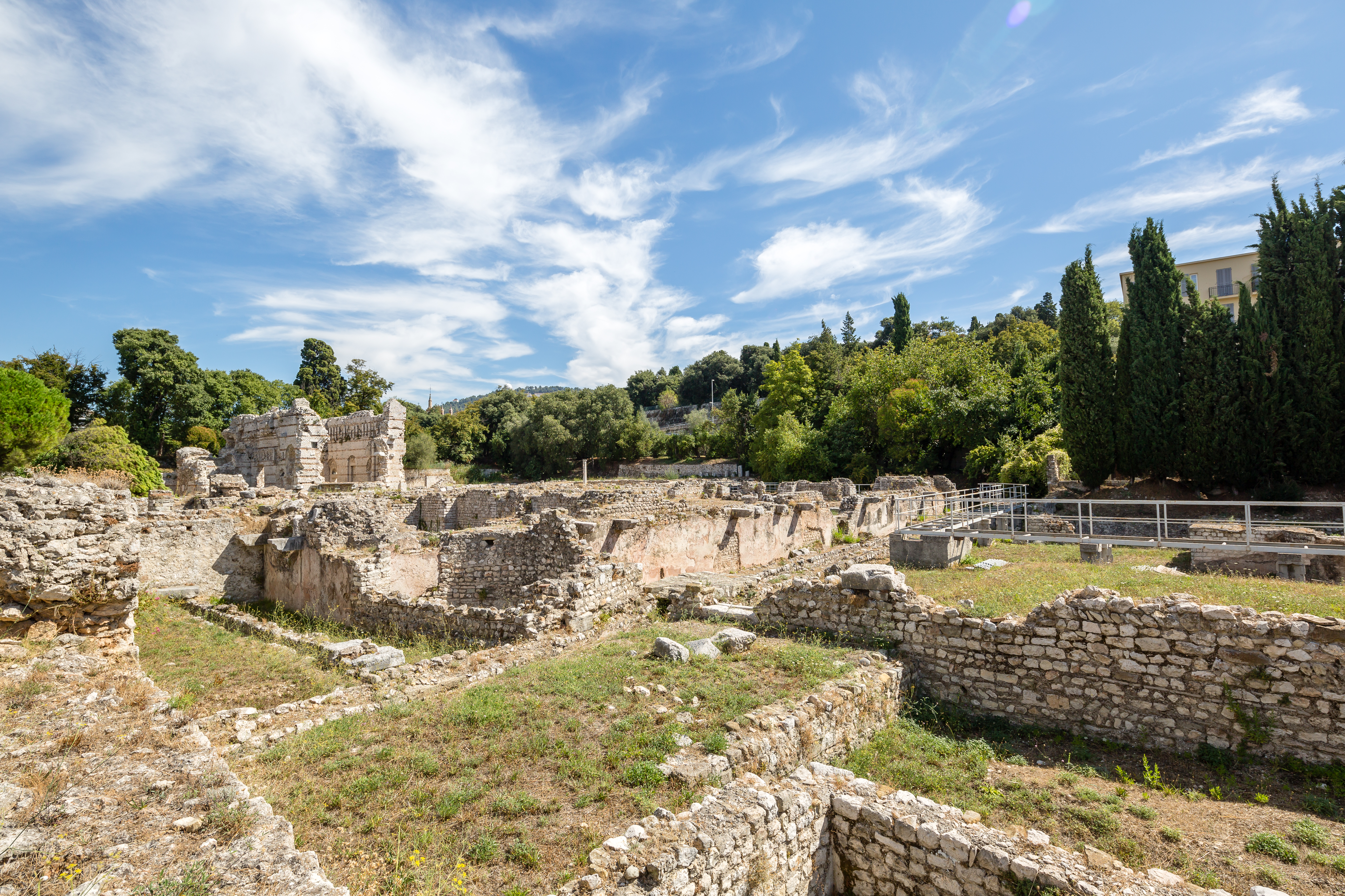 Les thermes romains de Cimiez à Nice (France).